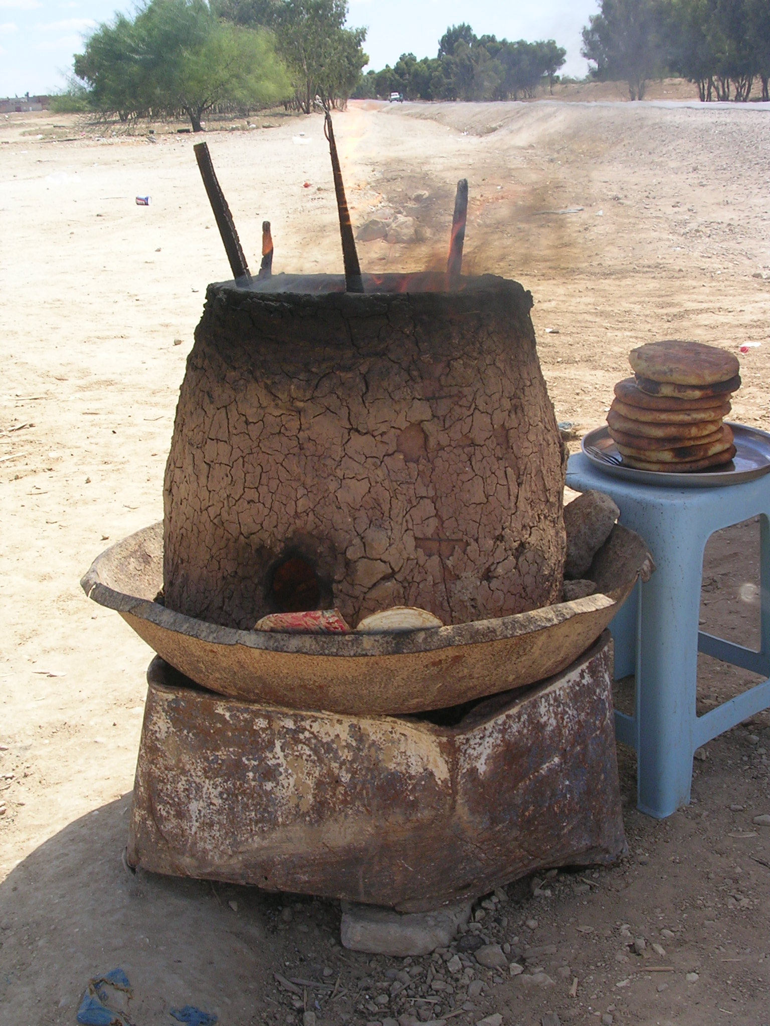 Four à tabouna photographié sur la route de Kairouan